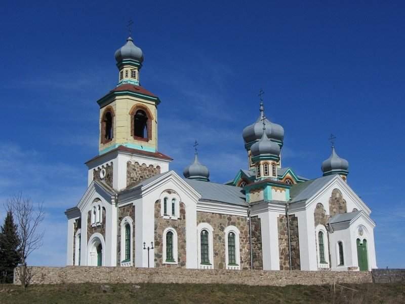 Турэц (Карэліцкі раён). Царква